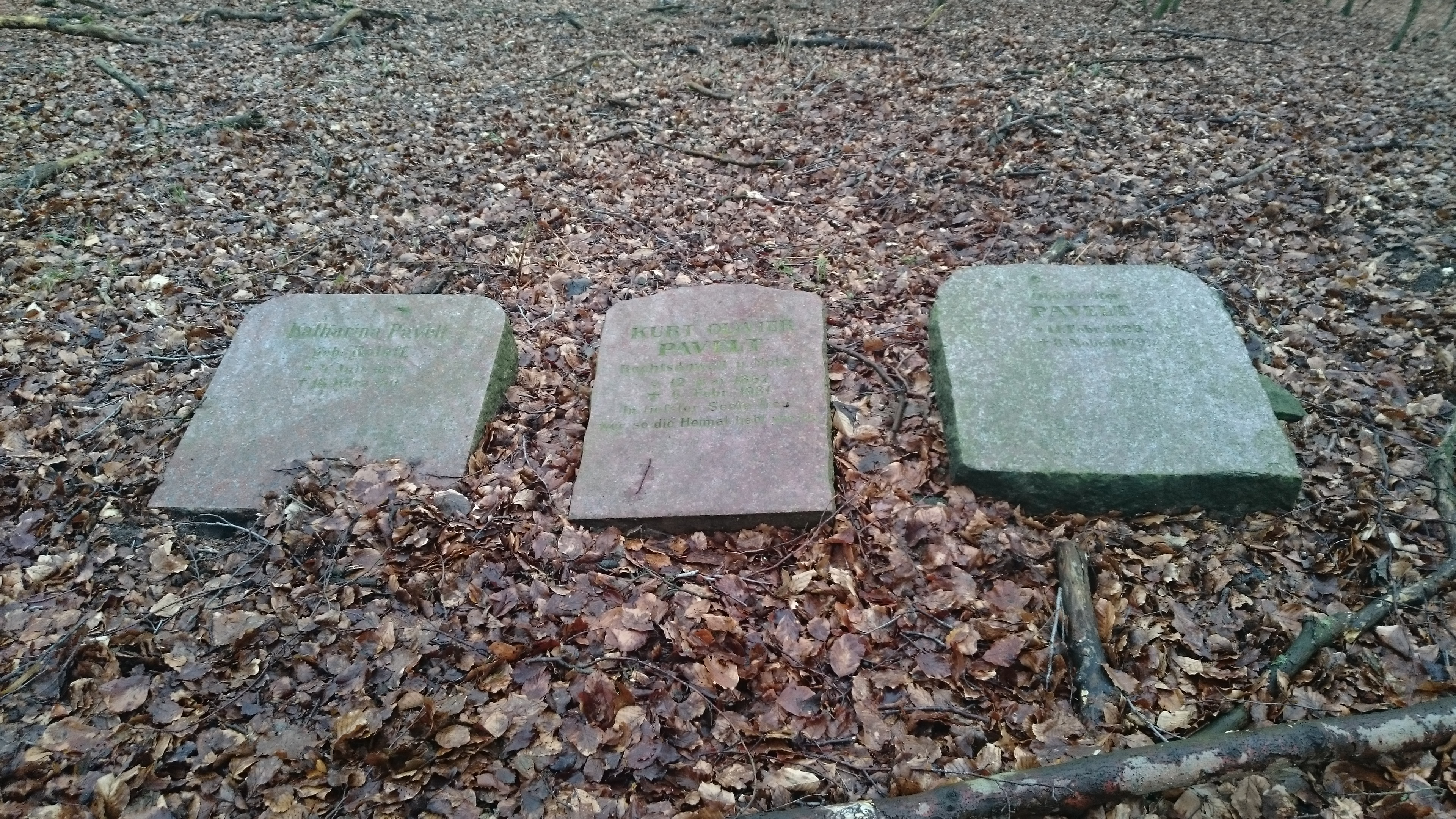 3 Grabsteine nordöstlich der Wallanlage Schlossberg (Werder) Inschriften: (v.r.n.l.) des Oberförster (des Forsthauses Werder) Pavelt * 11. Feb 1820 - † 8. Nov 1879, dem Rechtsanwalt und Notar Kurt Oliver Pavelt * 12. Mai 1867 - † 6. Feb 1931 mit Aufschrift "In tiefster Seele treu(,) wer so die Heimat liebt wie Du" und Katharina Pavelt geb. (unleserlich) * 4 Jul 1843 - 14. März 1911